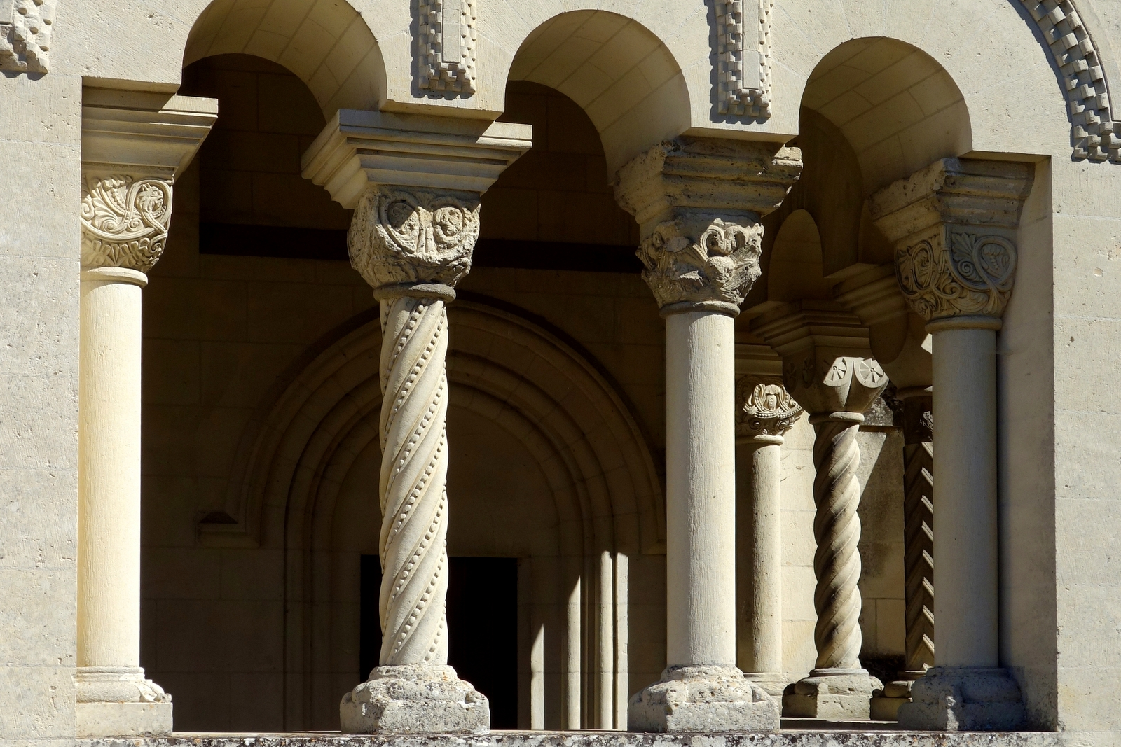 Colonnes du narthex reconstruit de Notre-Dame d'Urcel